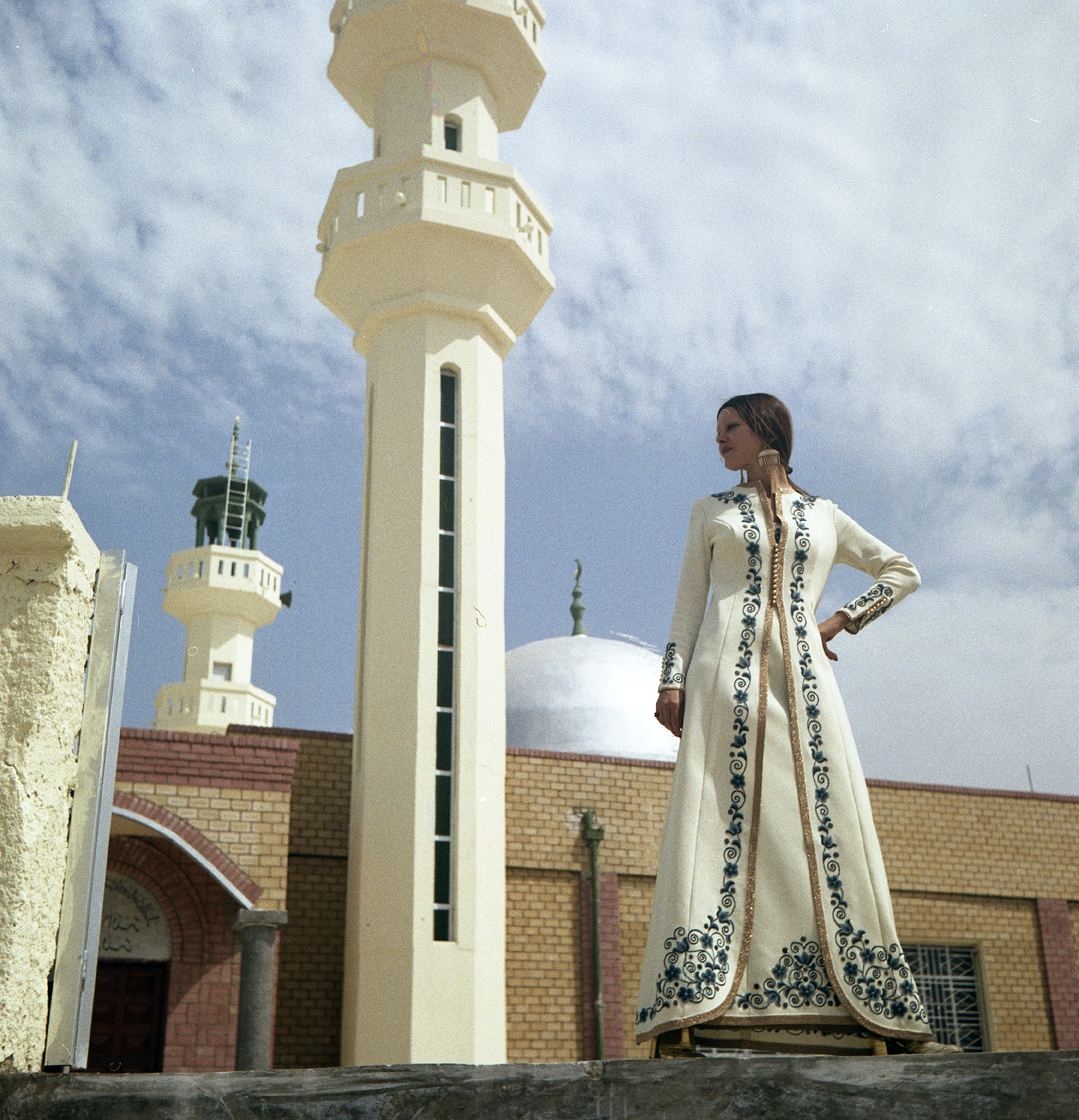 Felkai Anikó manöken. Tags: fashion, colorful, mosque, lady, coat, maxi dresses, earring Title: Felkai Anikó manöken.